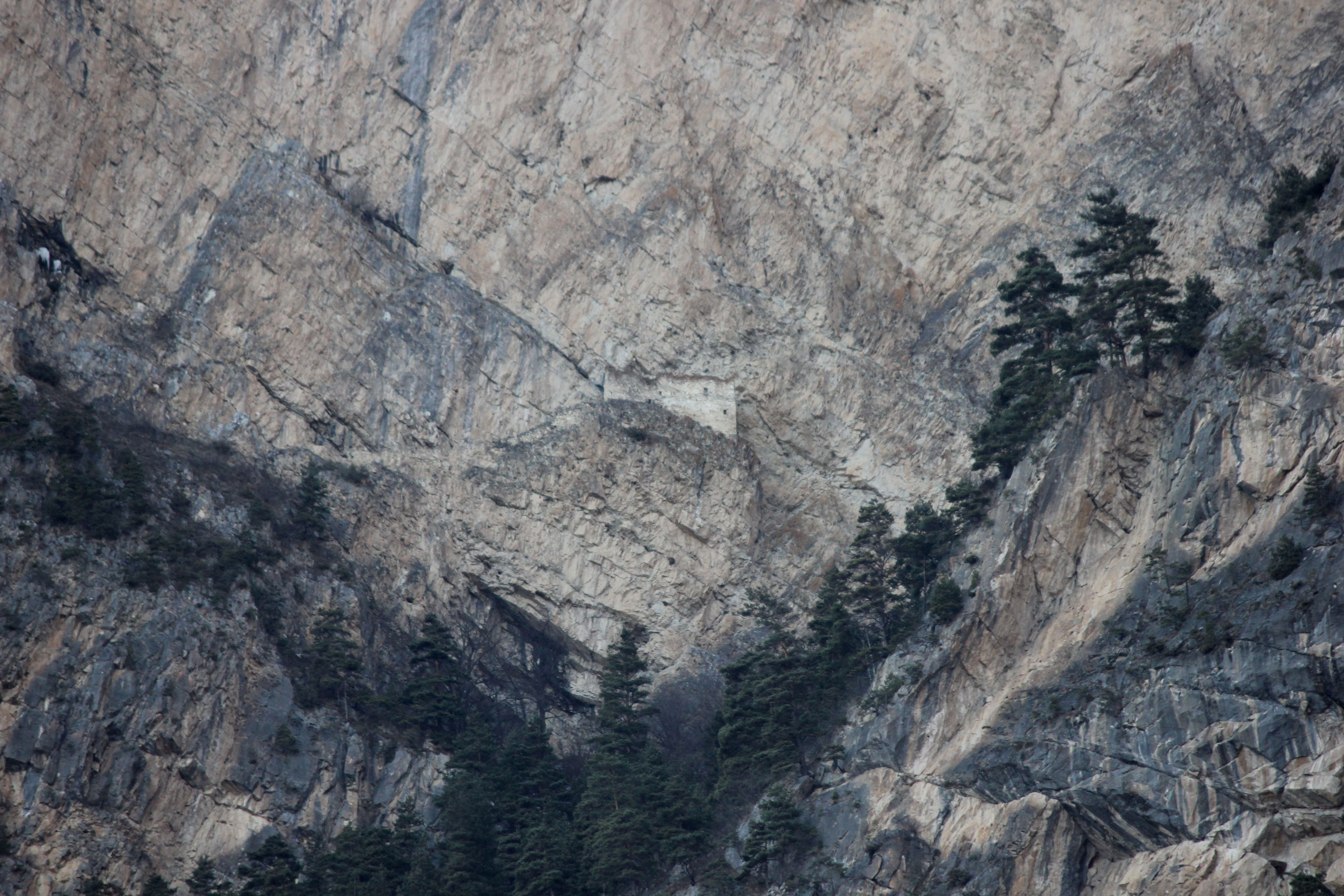 «Девичья башня» — средневековая ингушская наскальная башня. Расположена на крутом склоне Столовой горы (Мятлоам) в Джейрахском районе Республики Ингушетия